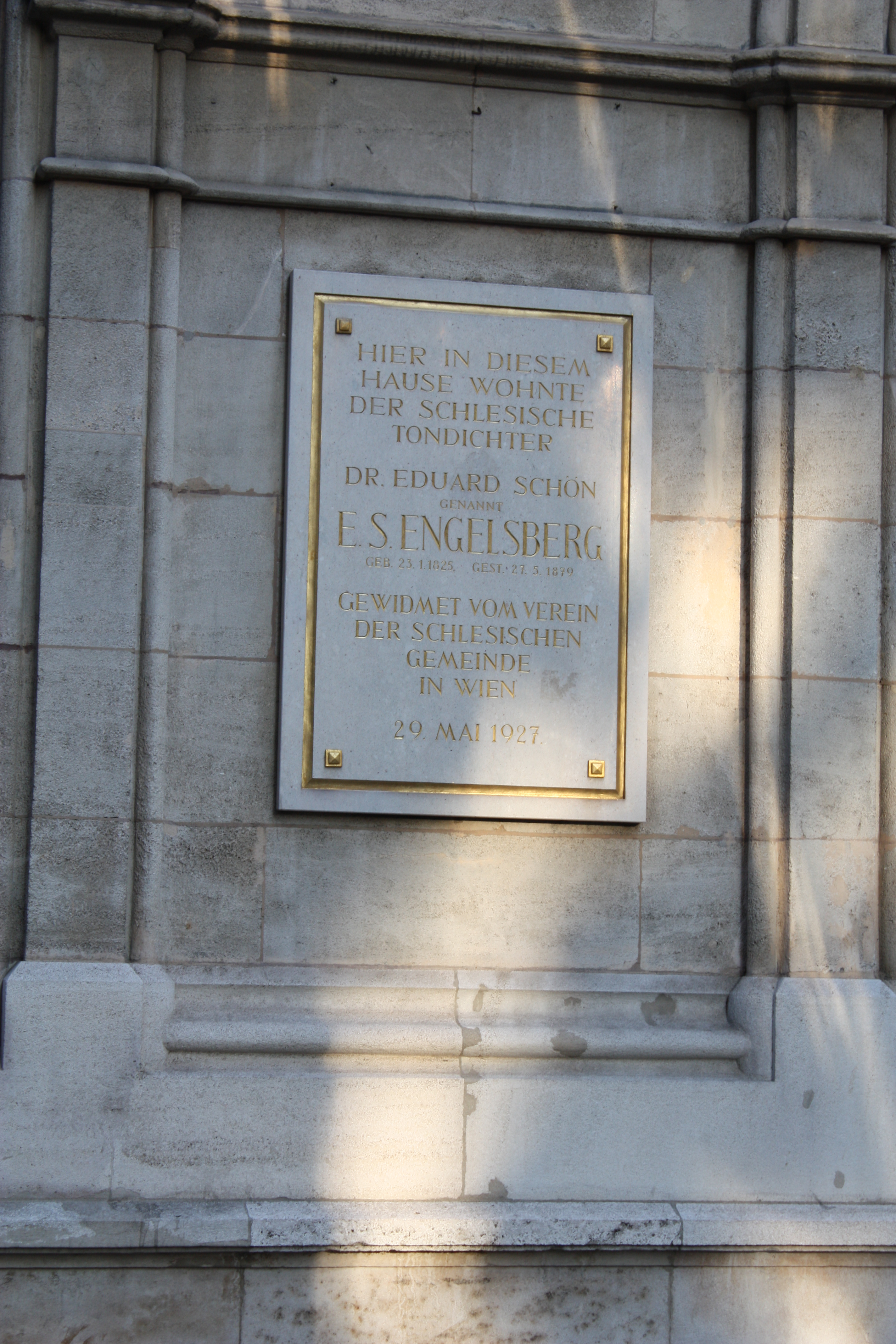 Zentrum, Vienna, Wien